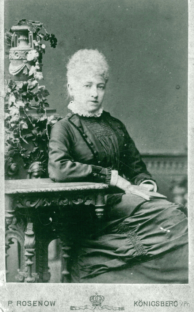 Cirkusartisten Laura Madigan